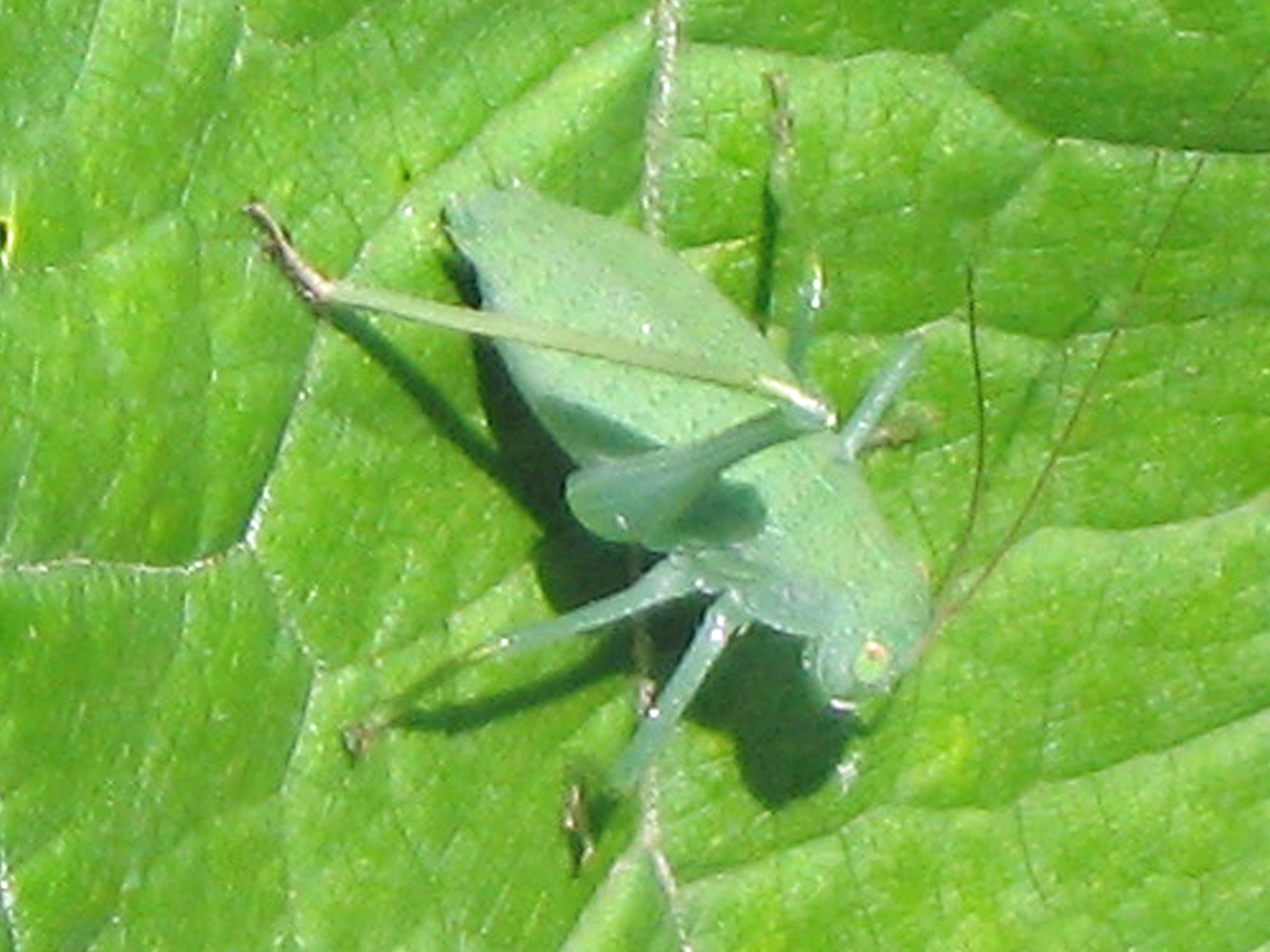 True Katydid, Pterophylla camellifolia